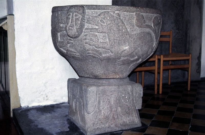 Kobberup Kirke, døbefont